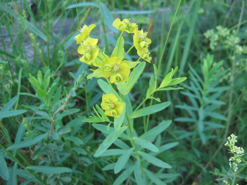 Scharfe Wolfsmilch (Esels-Wolfmilch) Euphorbia esula